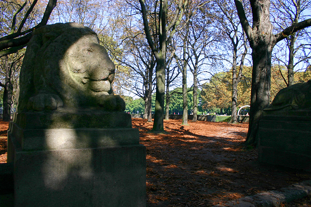 Blücherpark Cologne, Germany. author: Elke Wetzig (elya) date: 2005-09-18